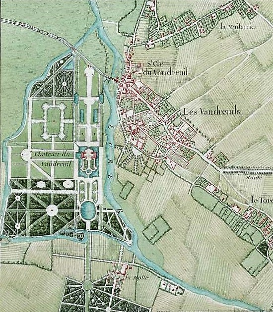 Carte du Vaudreuil au XVIII° siècle. Le château éponyme (disparu) occupe la surface de l'île l'Homme, assimilée par le golf contemporain du même nom. L'île est bordée par l'Eure et la Morte Eure.